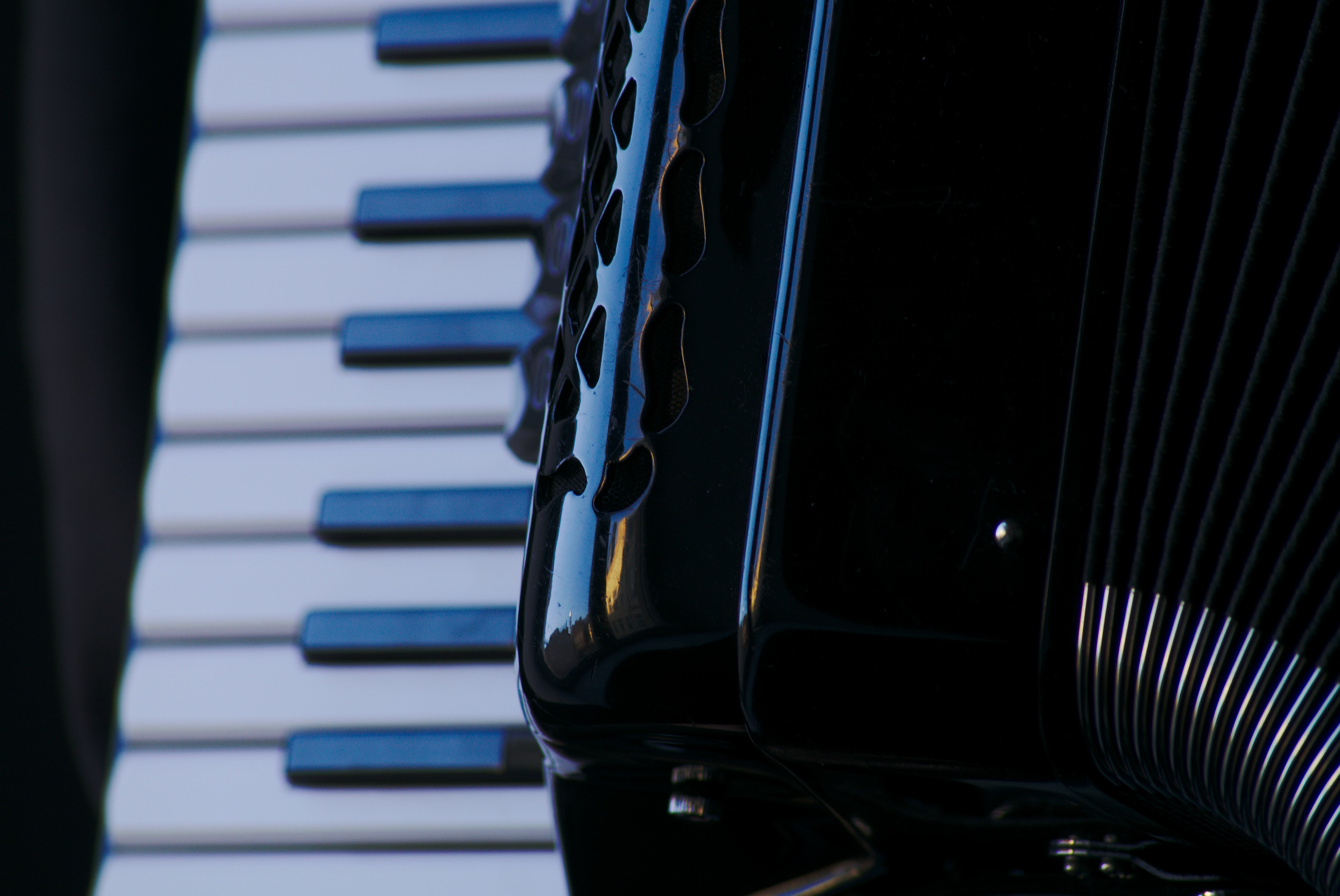 Фрагмент акордеона «Vignioni».